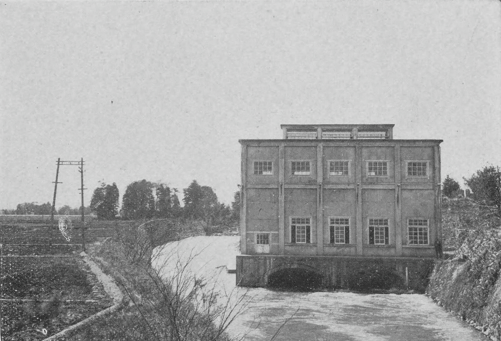 高岡電灯成子発電所（現・北陸電力成子発電所）